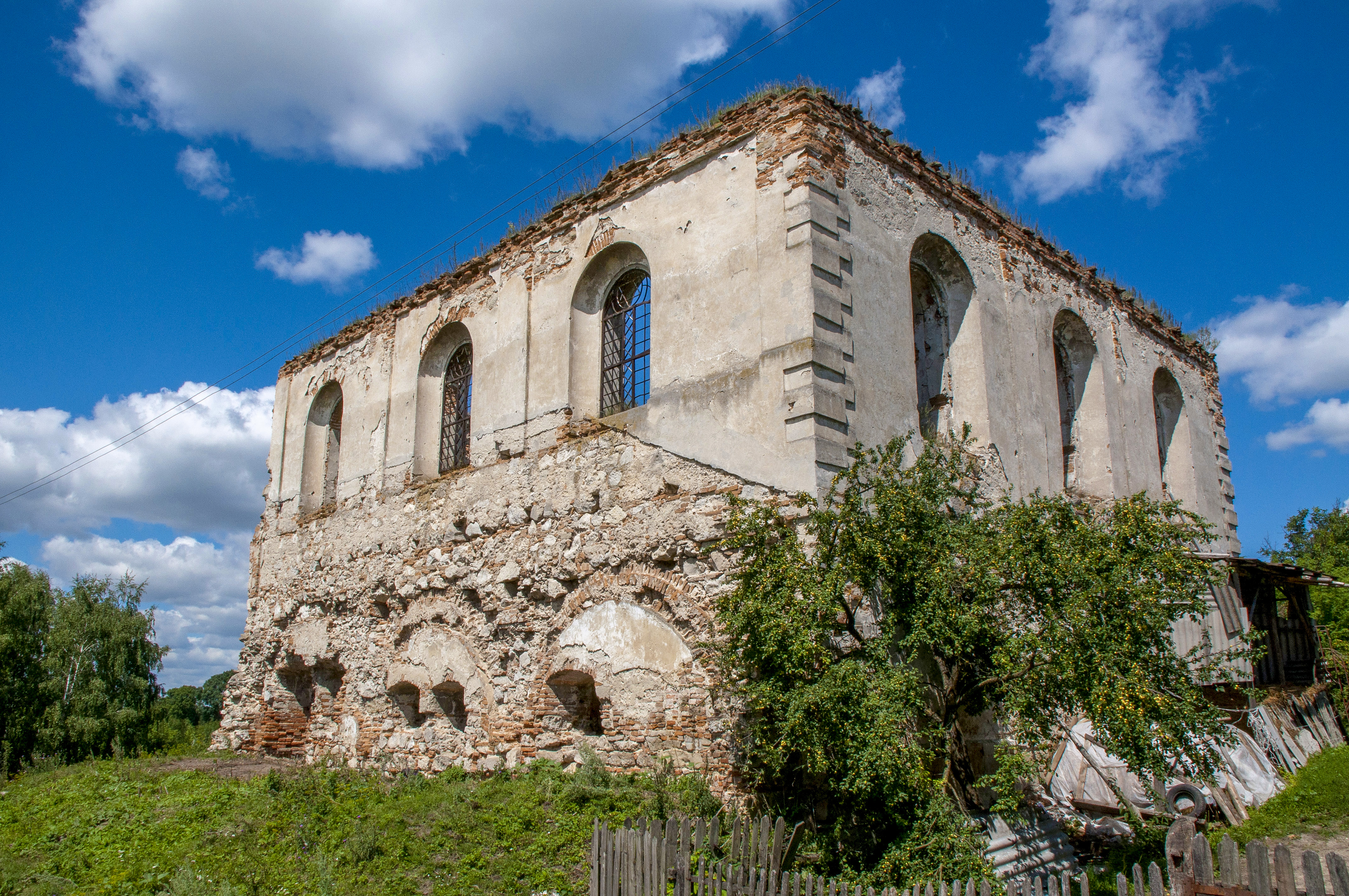 Синагога (мур.), Гримайлів, Тернопільська область, Гусятинський район